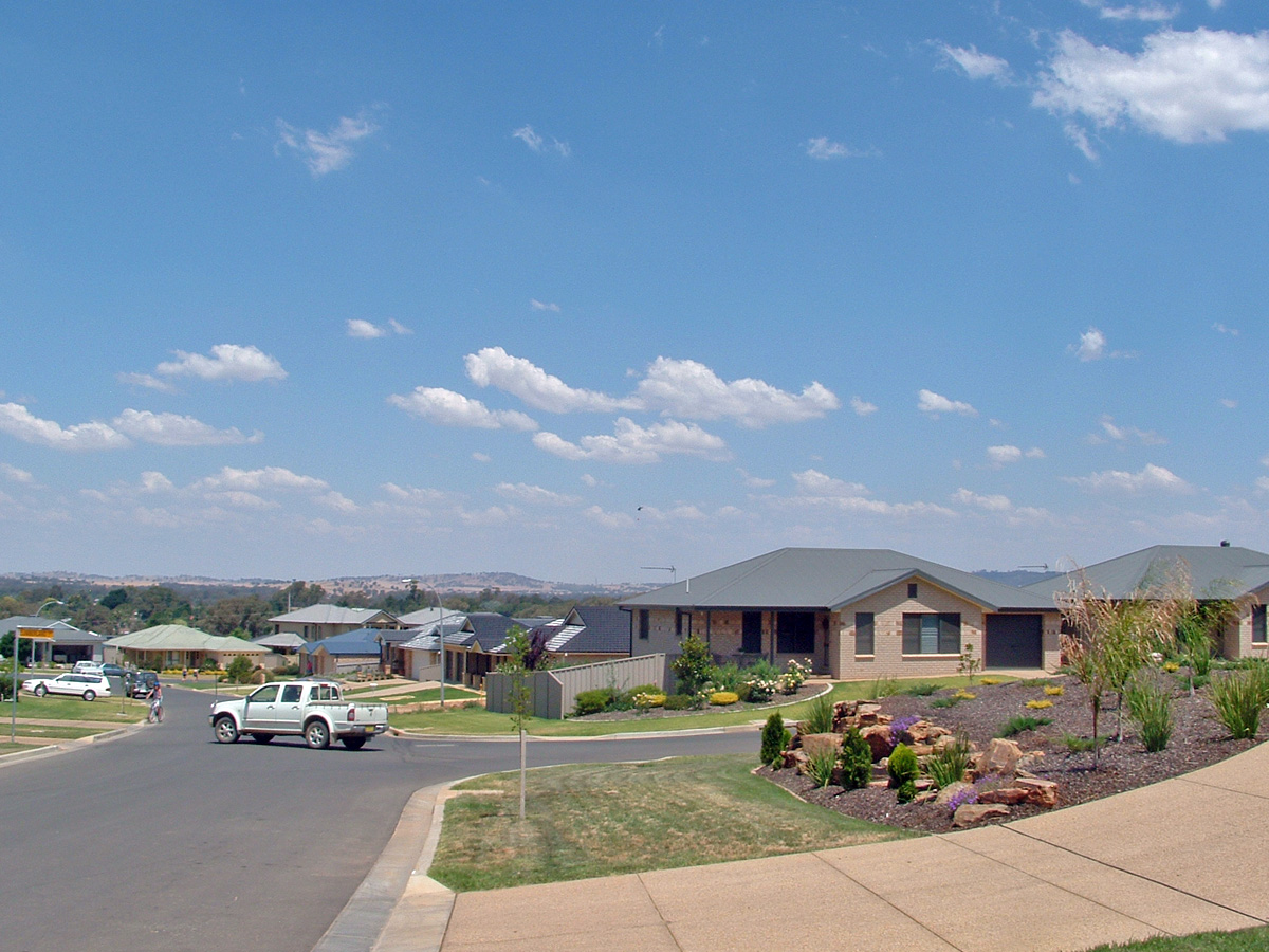 Tamar Drive in Tatton. Wagga Wagga